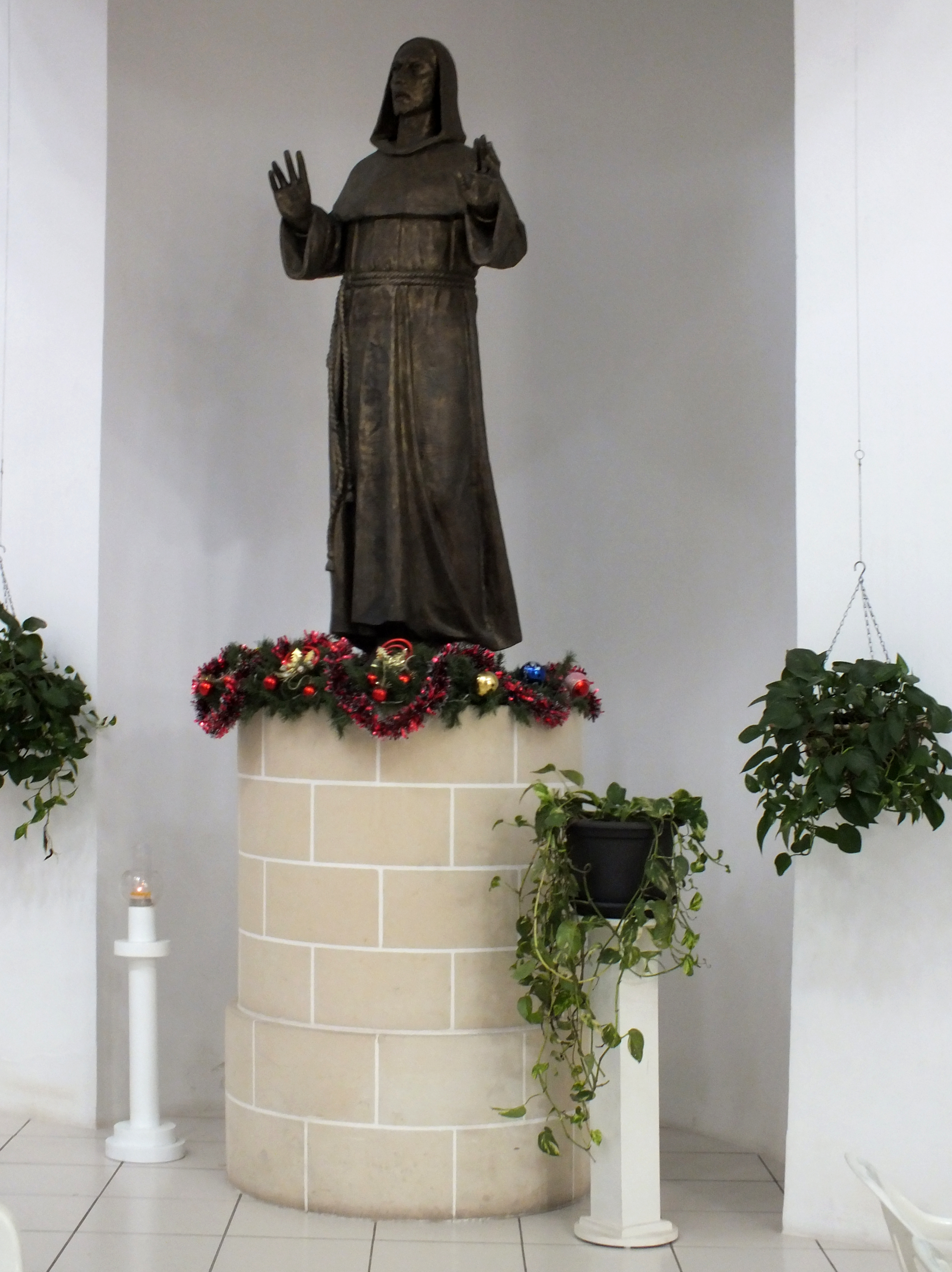 Malta, St. Franziskus-Kirche (Church of St Francis of Assisi), Ortsteil Qawra von St Pauls bay